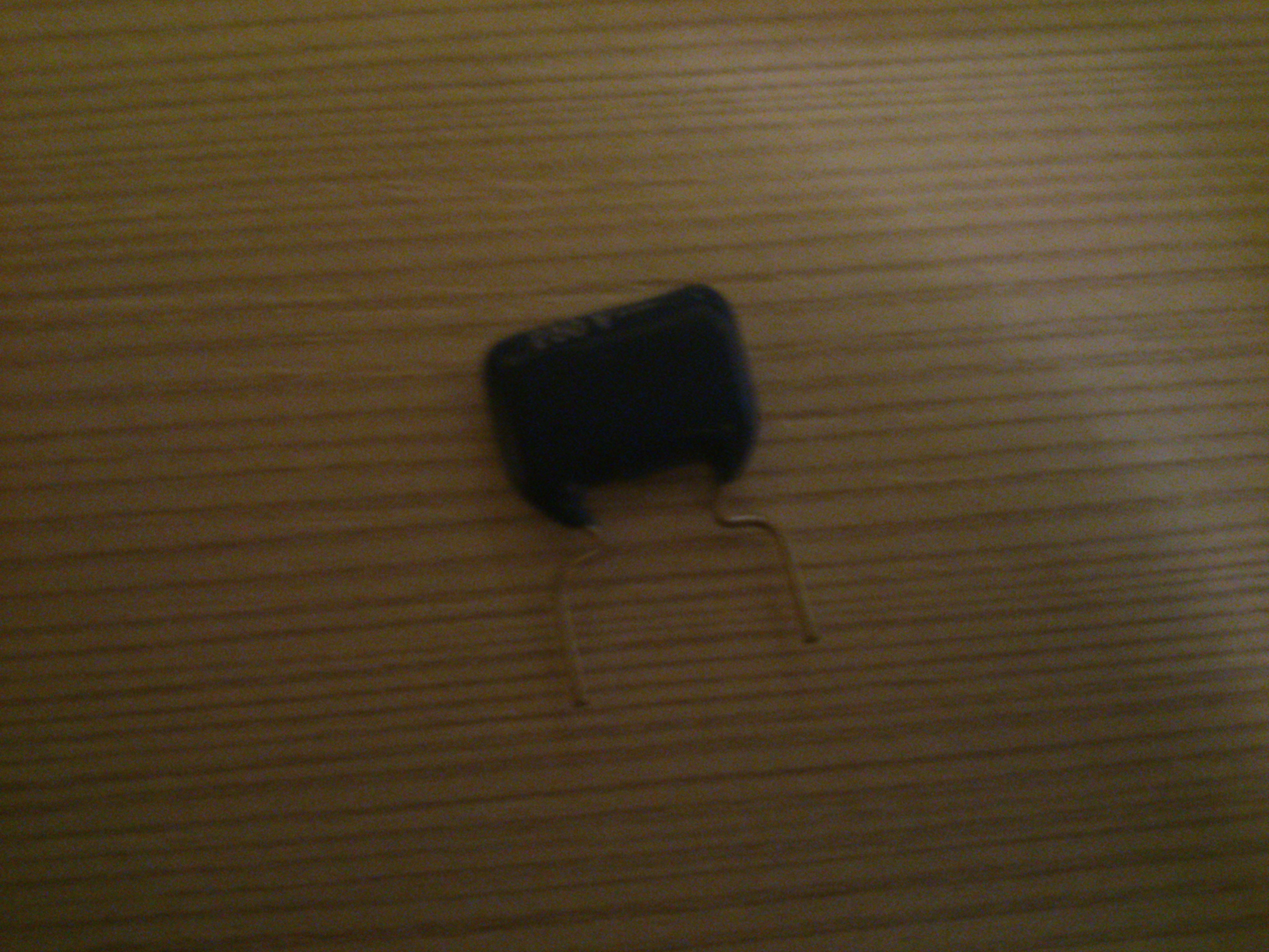 Condensador Plastico